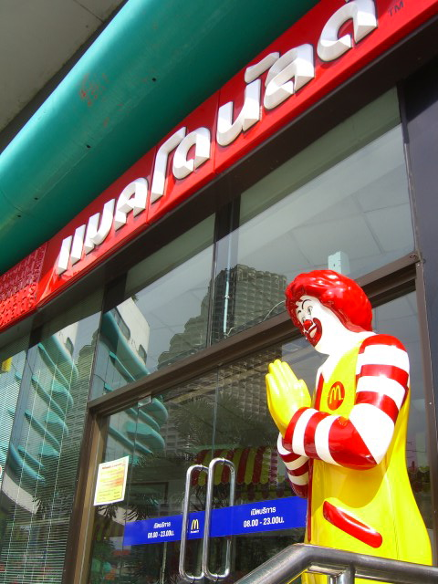 McDonald's in Bangkok, Thailand